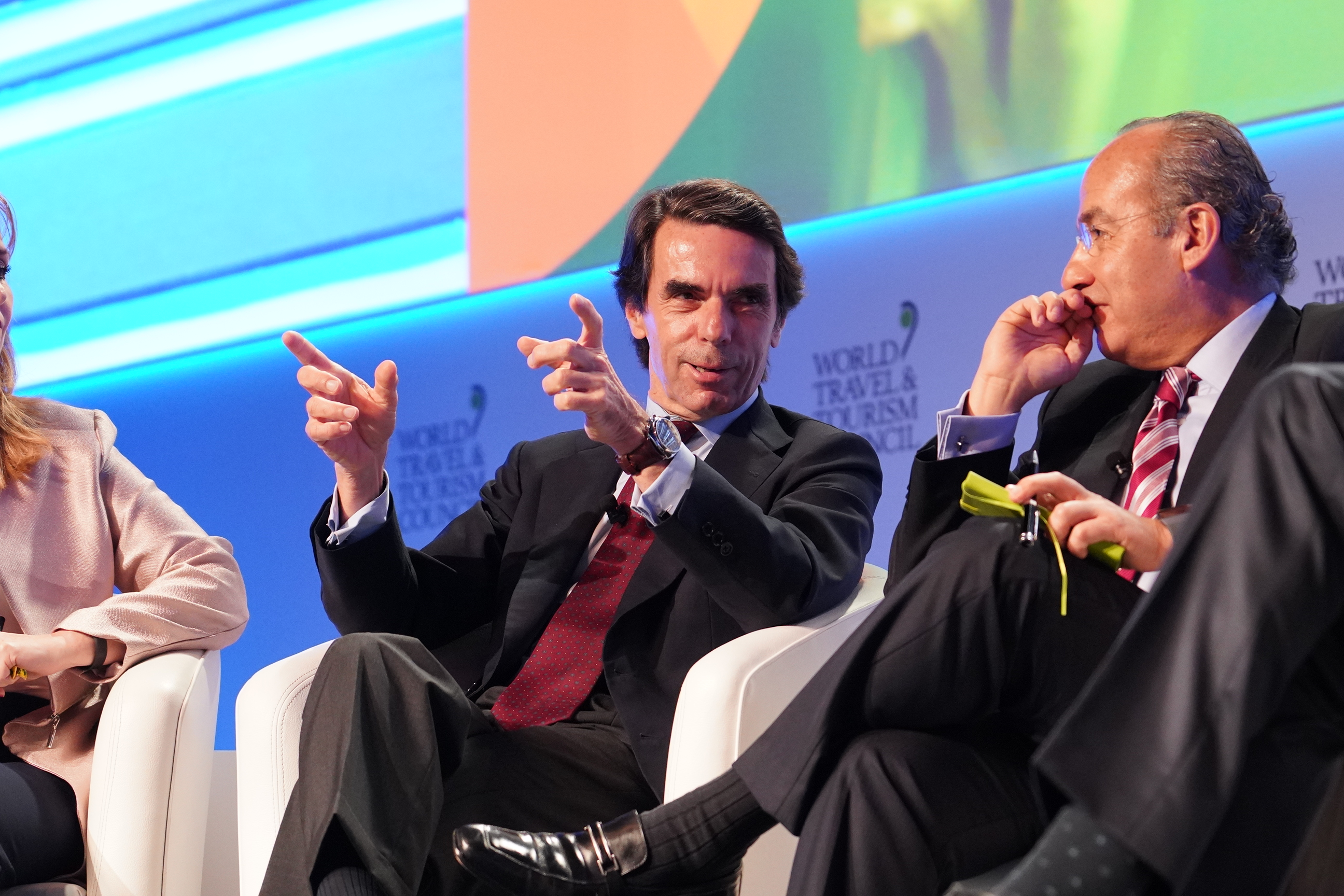 José María Aznar, Prime Minister, Spain, 1996-2004 Felipe Calderón Hinojosa, President of Mexico, 2006-2012